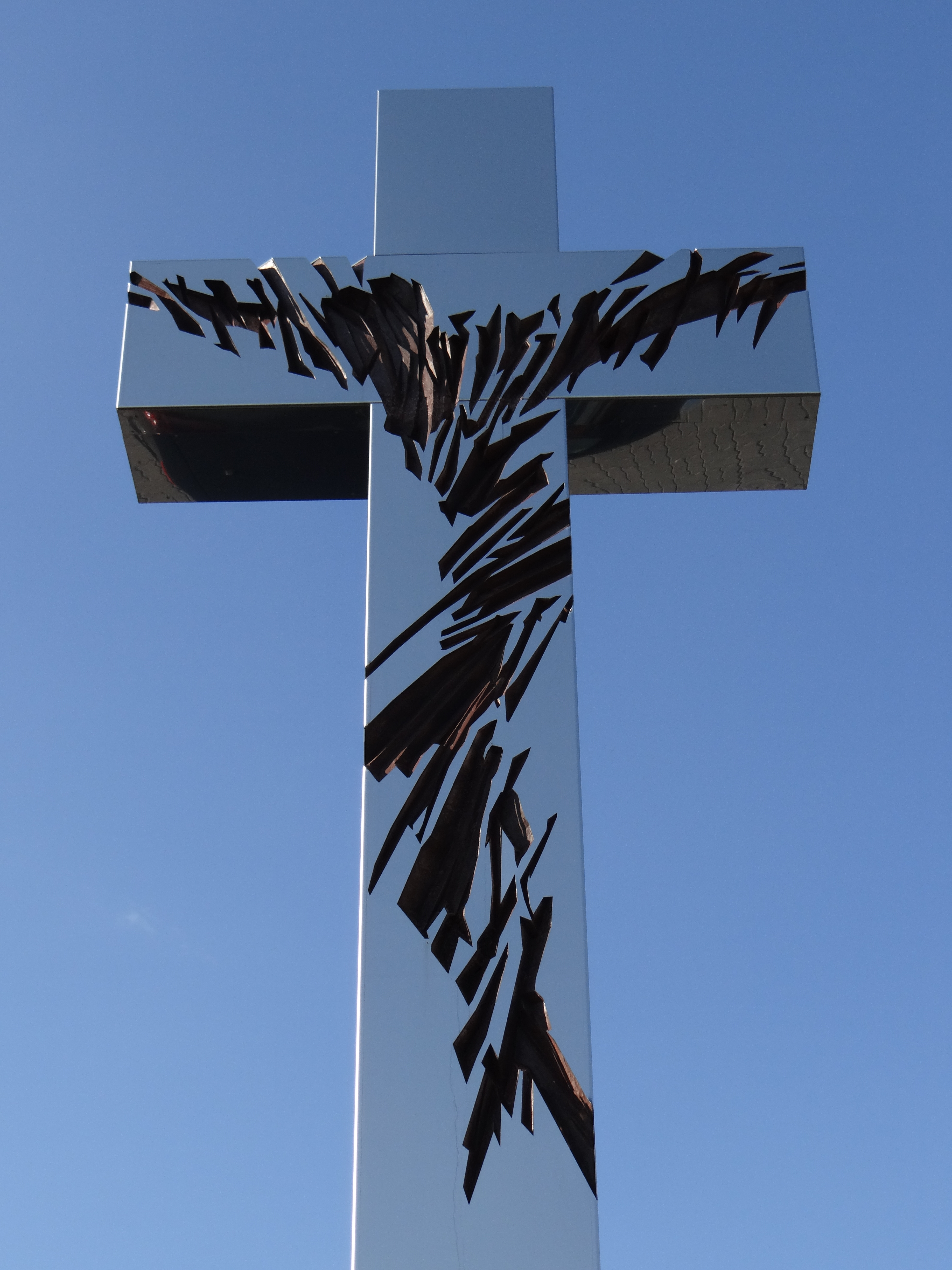 Pomnik masowego mordu dokonanego przez Niemieckich faszystów na 12 tysiącach niewinnych istnień Polskich, w tym pacjentach Szpitala Wolskiego w okresie od 5 do 12 sierpnia 1944 roku.